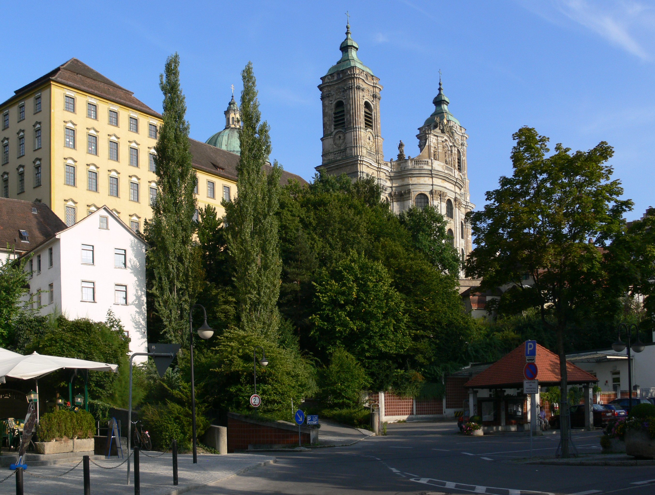 Weingarten (Württemberg), Landkreis Ravensburg Nördlicher Klostertrakt (diese Teile heute Pädagogische Hochschule) mit Basilika